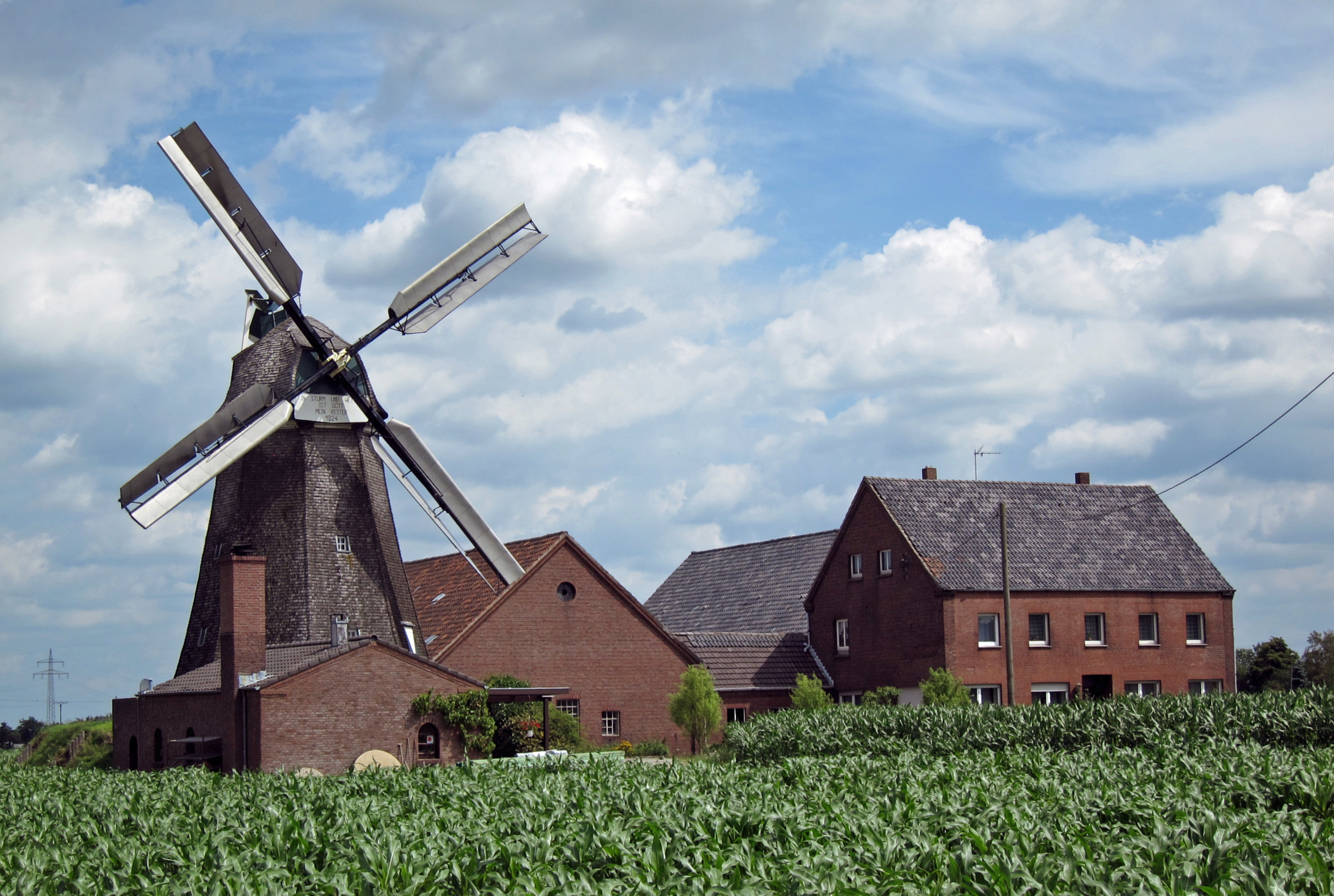 Die Windmühle liegt bei Donsbrüggen, einem Stadtteil von Kleve, im Nordwesten von Nordrhein-Westfalen. Vom Typ her ist sie eine hölzerne achteckige Holländermühle die auf einem Erdwall steht. Sie wurde im Jahre 1824 erbaut und war bis 1957 in Betrieb. Ab 1982 wurde sie vom Förderkreis Alte Mühle Donsbrüggen renoviert und 1985 als Museum wieder in Betrieb genommen. Die Windmühle hat eine Höhe von 20 Meter, der Durchmesser der Rotorblätter beträgt 21 Meter. Sie trägt die Inschrift „In Sturm und Wetter ist Gott mein Retter 1824“.